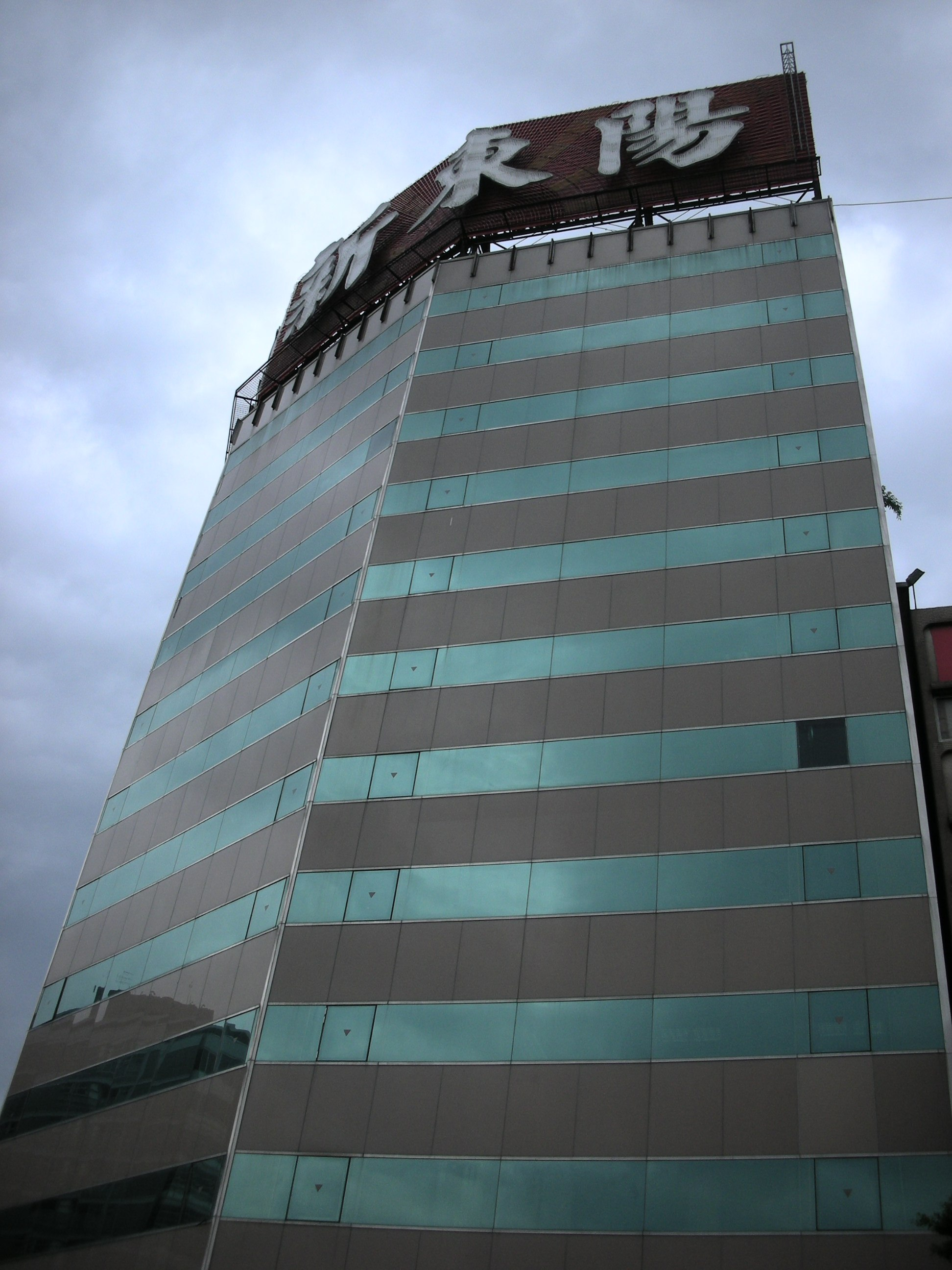 捷運新生站走到敦化站